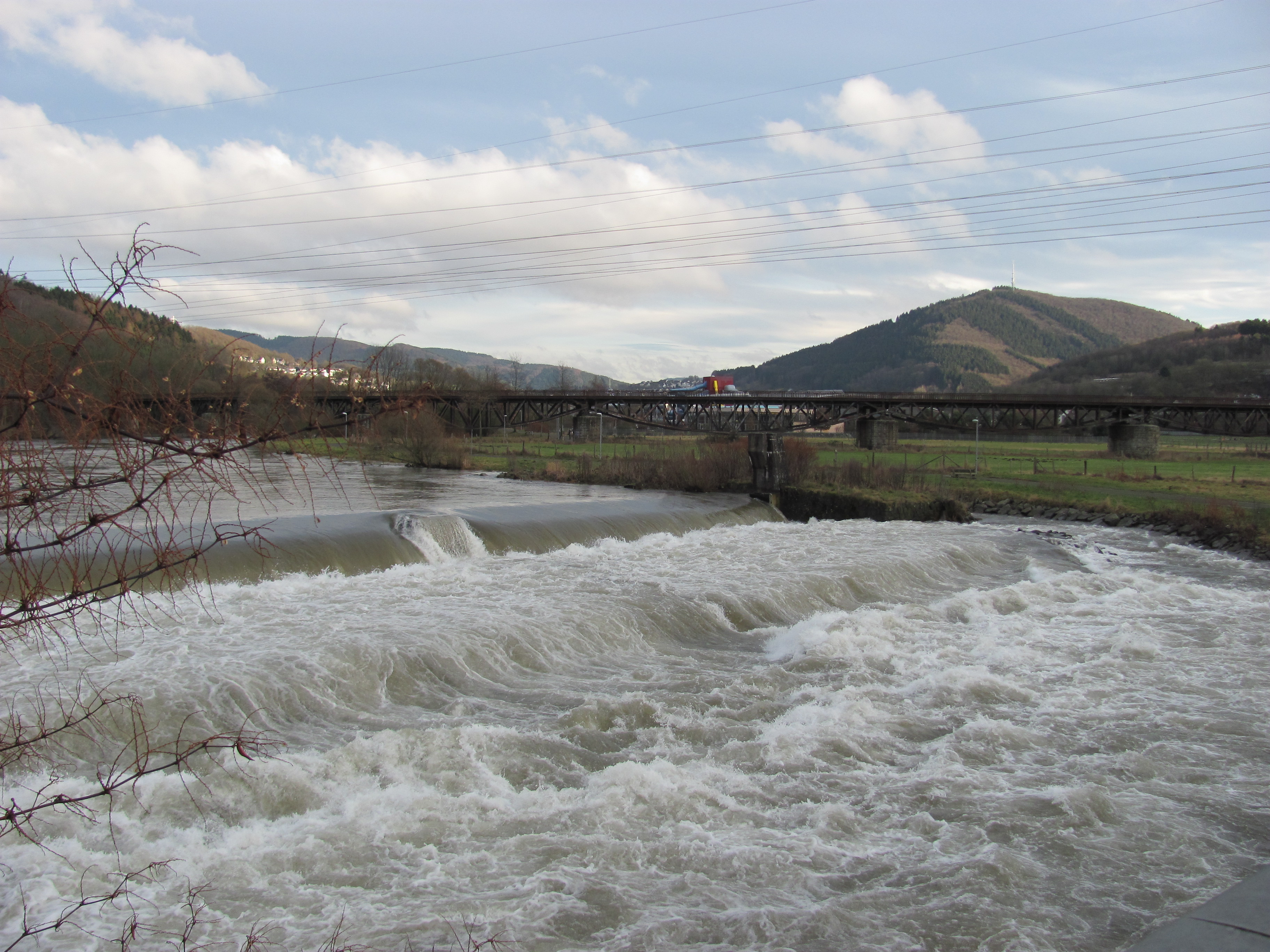 Überfall des Wehres der Wasserkraftanlage Ohle in Plettenberg, im Hintergrund die Fischbauch-Eisenbahnbrücke in Ohle